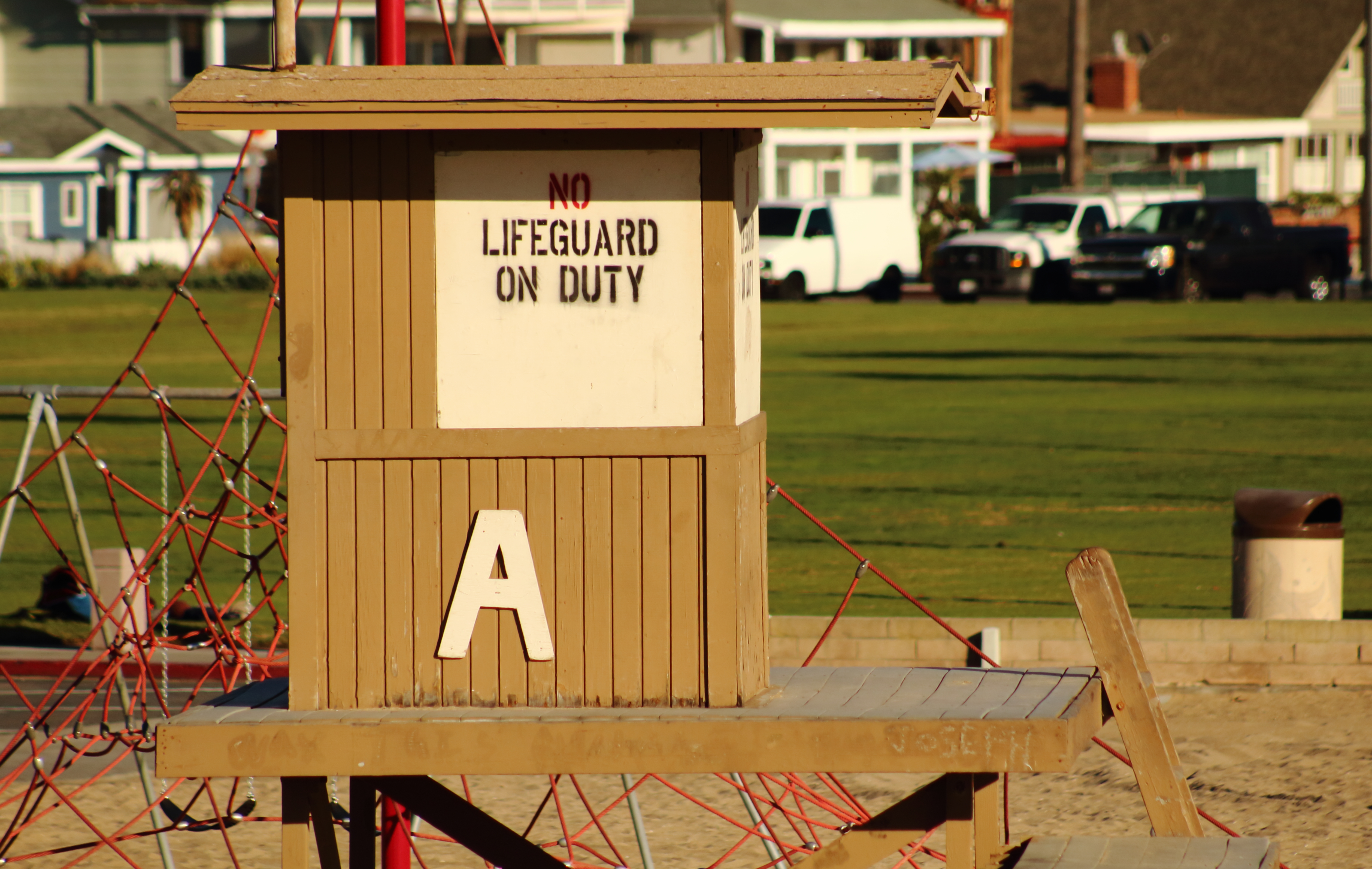 Anuncio de socorristas en Newport Beach, California.